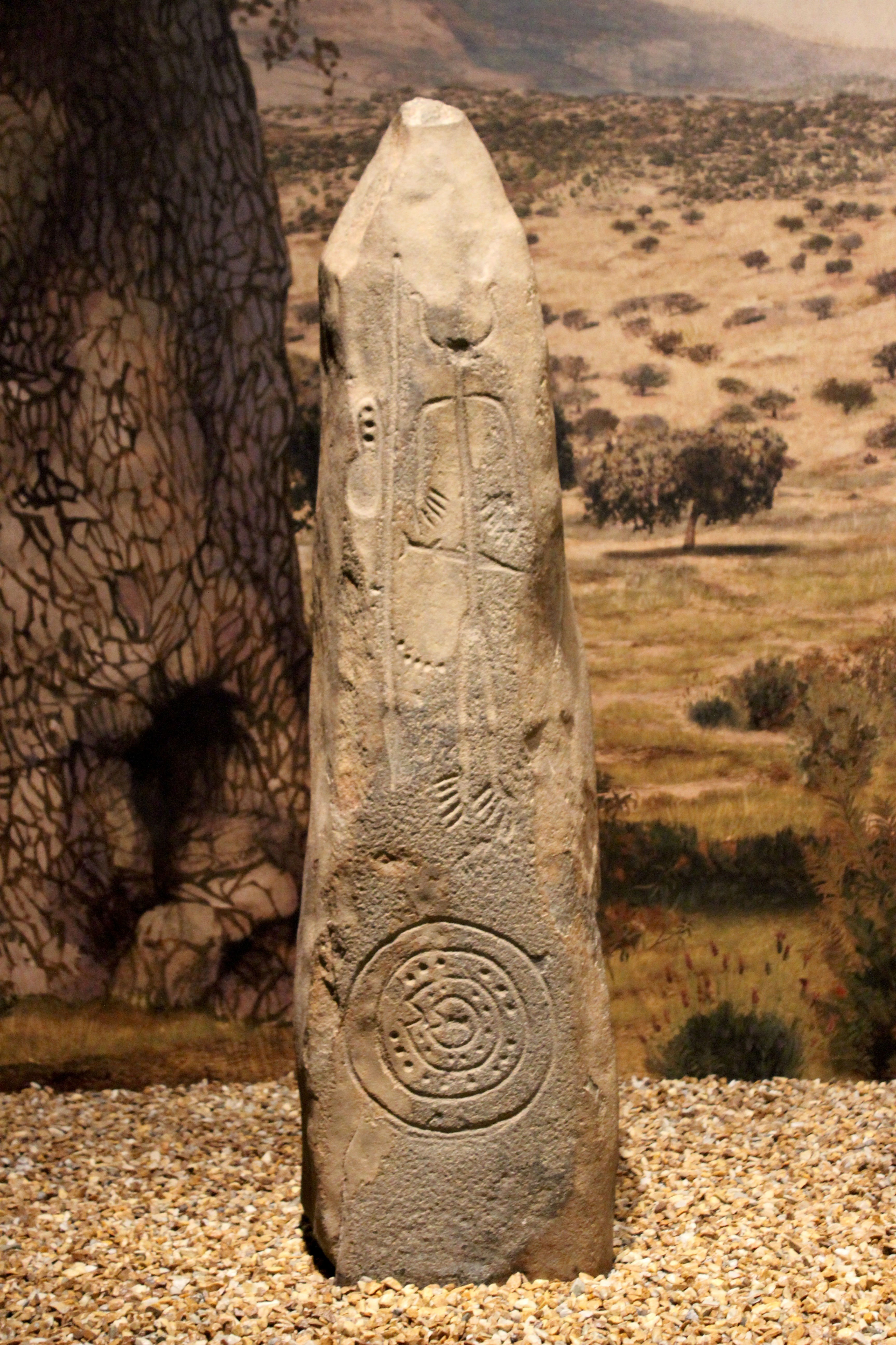 Madrid. M.A.N. Estela de la Edad del Bronce procedente de Magacela.